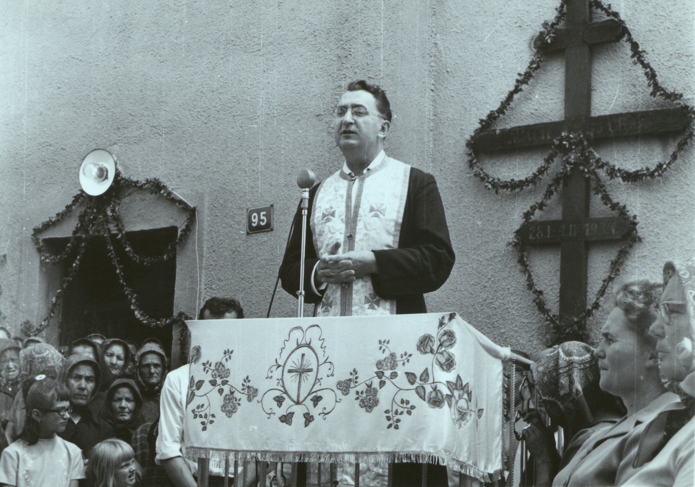 Stefan Papp (Степан Пап) v 70-tych rokoch 20. storočia